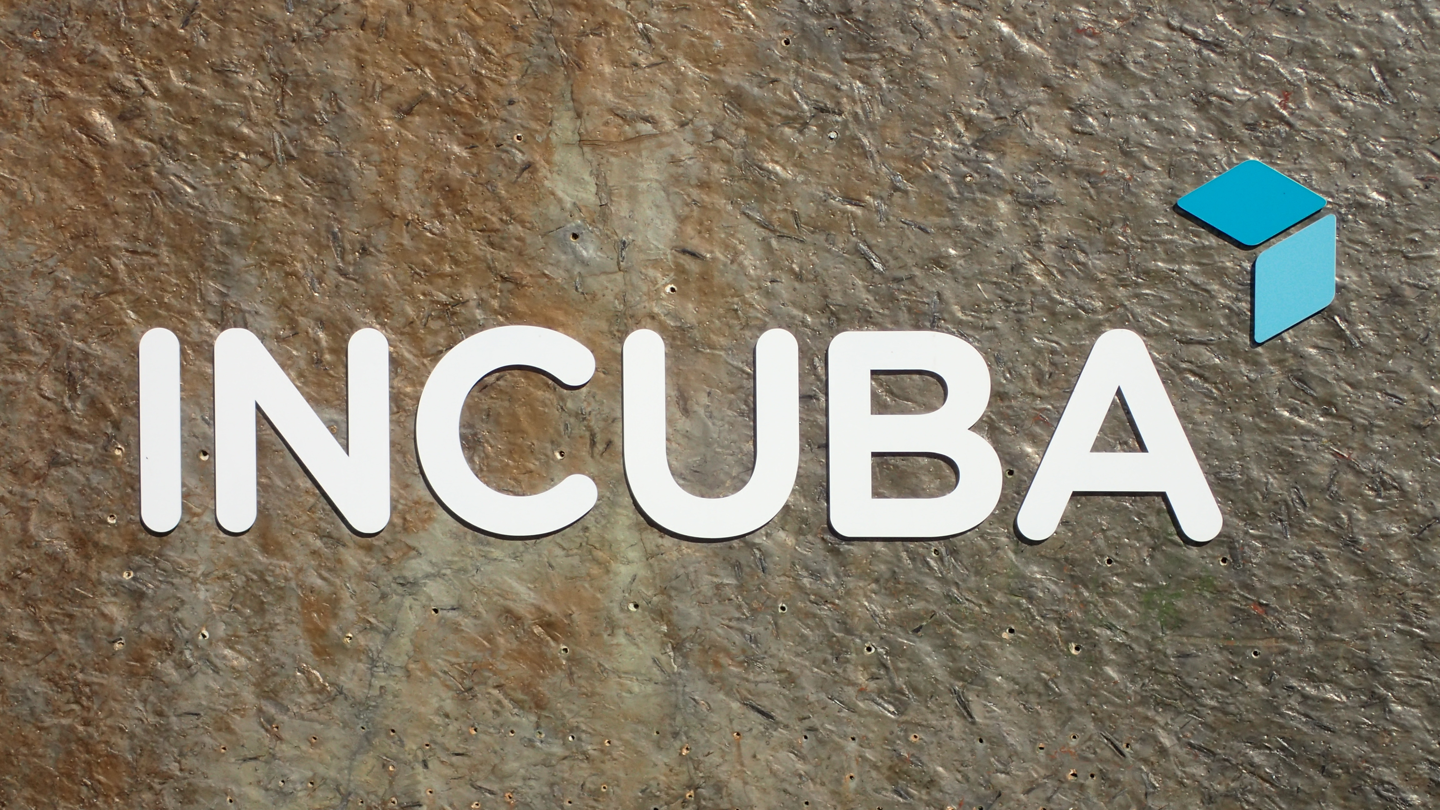 INCUBA logo